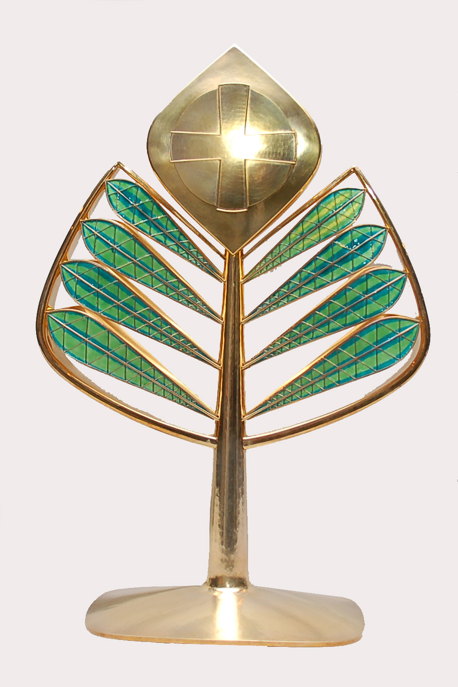 Monstranz erstellt in der Kunstwerkstatt Maria Laach